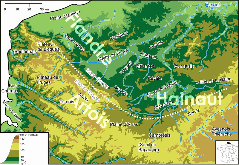 localisation des pays du Nord-Pas-de-Calais (d'après principalement Jules Gosselet sur une carte orographique du Nord de la France, carte créée par Laurent Deschodt en 2005 Licensing Catégorie:Carte Nord-Pas-de-Calais